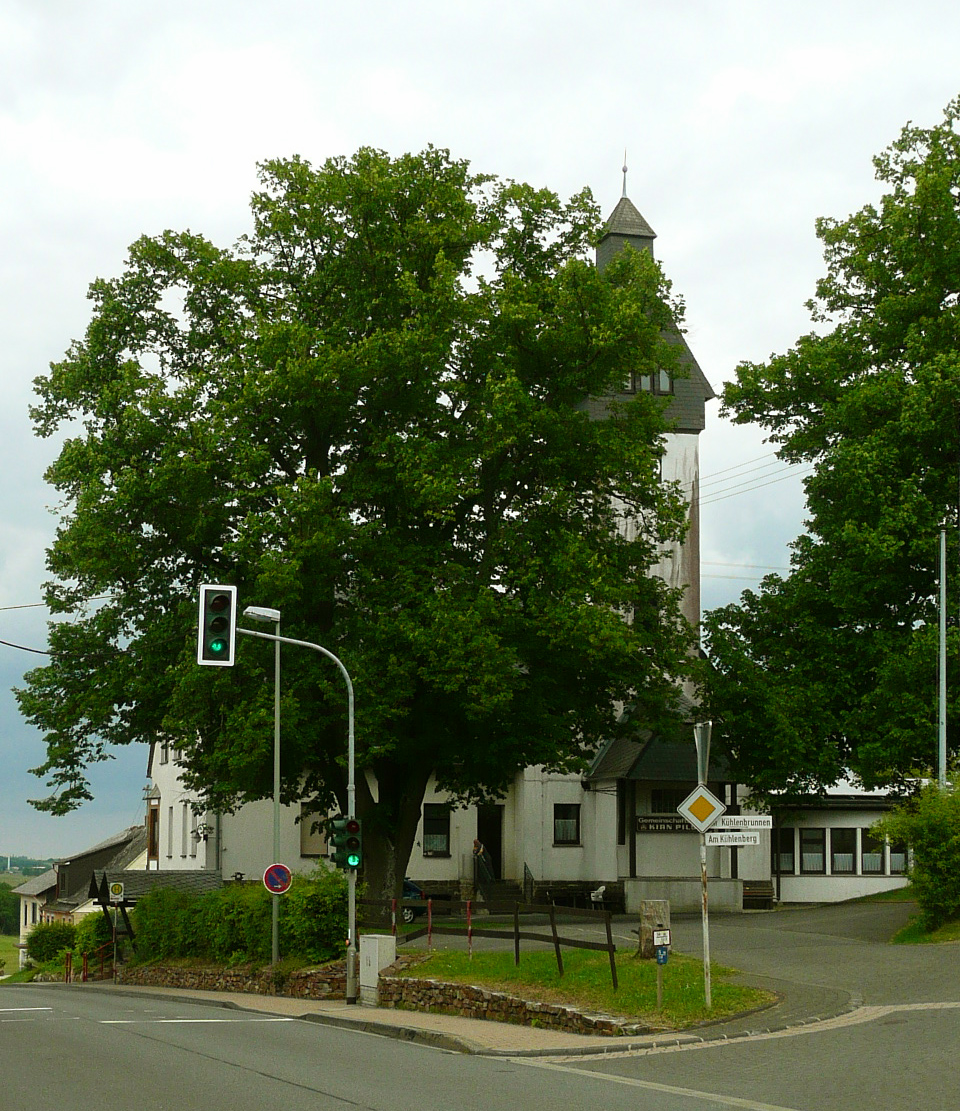 Oberbrombach, Dofgemeinschaftshaus; davor Naturdenkmal "Zwei Linden"